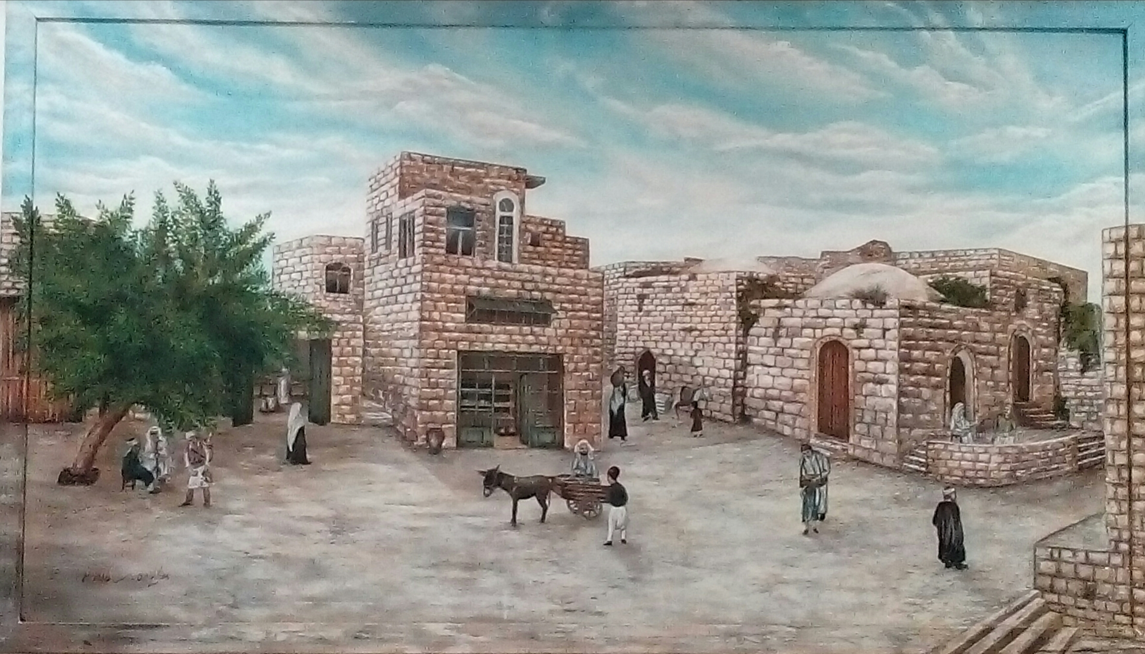 مظهر عام للساحة العامة - البلدة القديمة - سلفيت